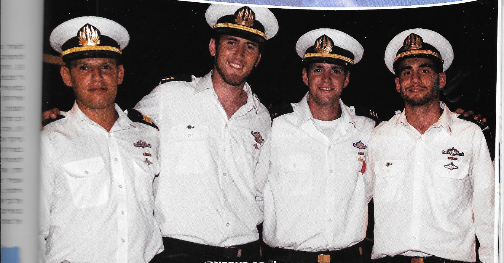 חלק מקציני הספינות שזכו לציון לשבח ממפקד חיל הים ומפקד בסיס חיפה